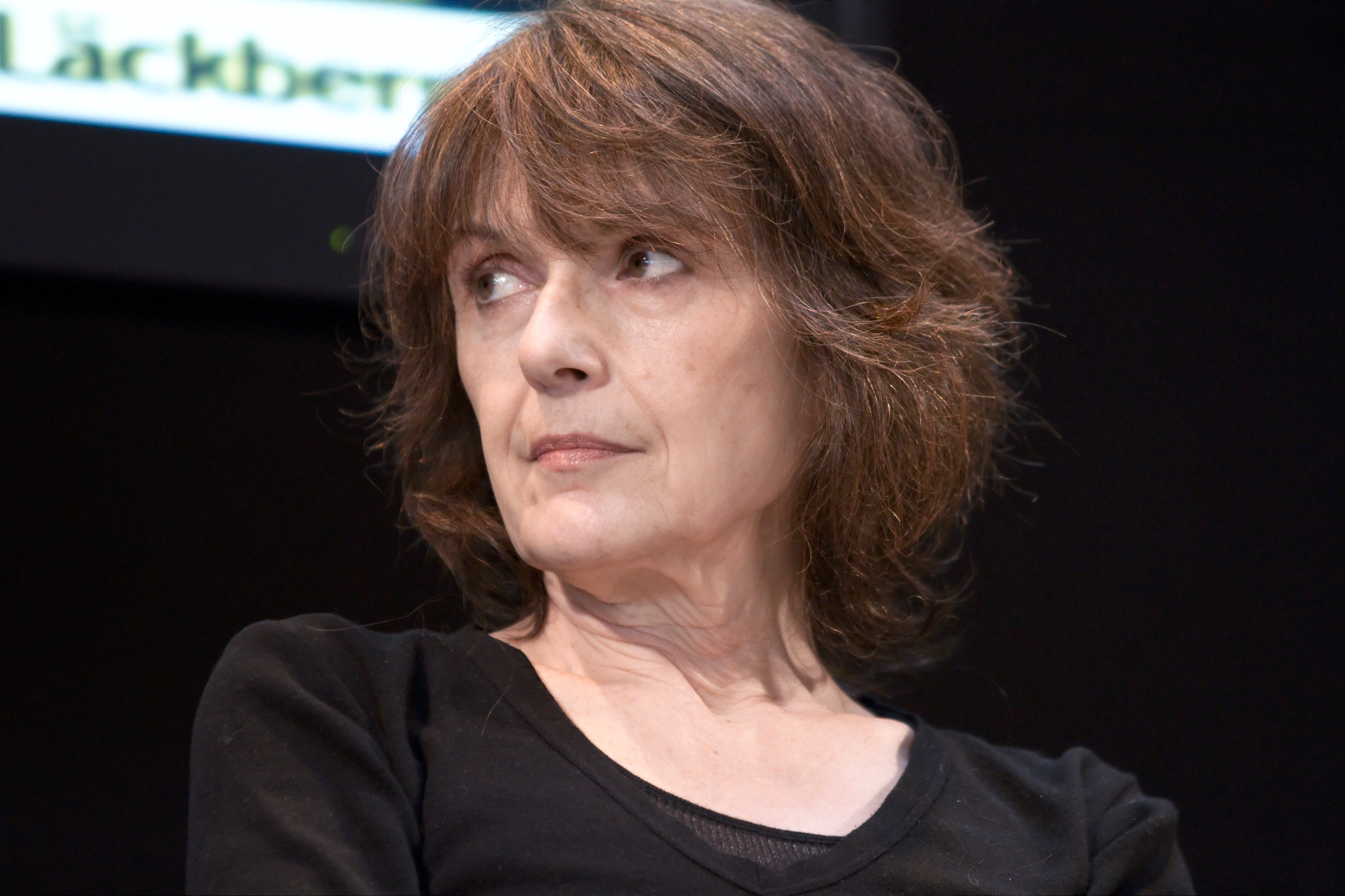 Michèle Lesbre au Salon du livre de Paris lors de la conférence Le Polar comme forme d'expression.